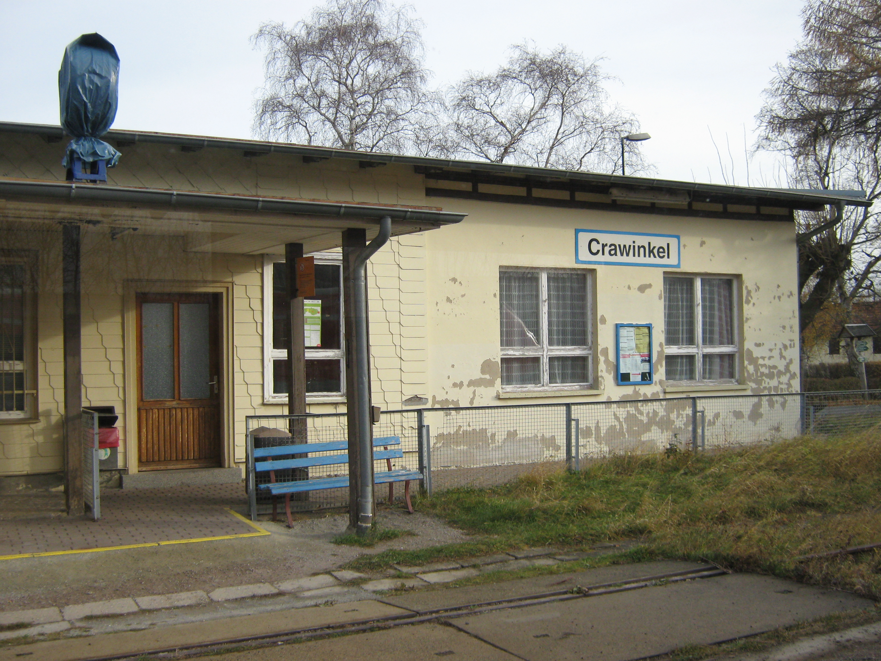 Der Bahnhof Crawinkel in Thüringen auf der Strecke Gräfenroda-Gotha.